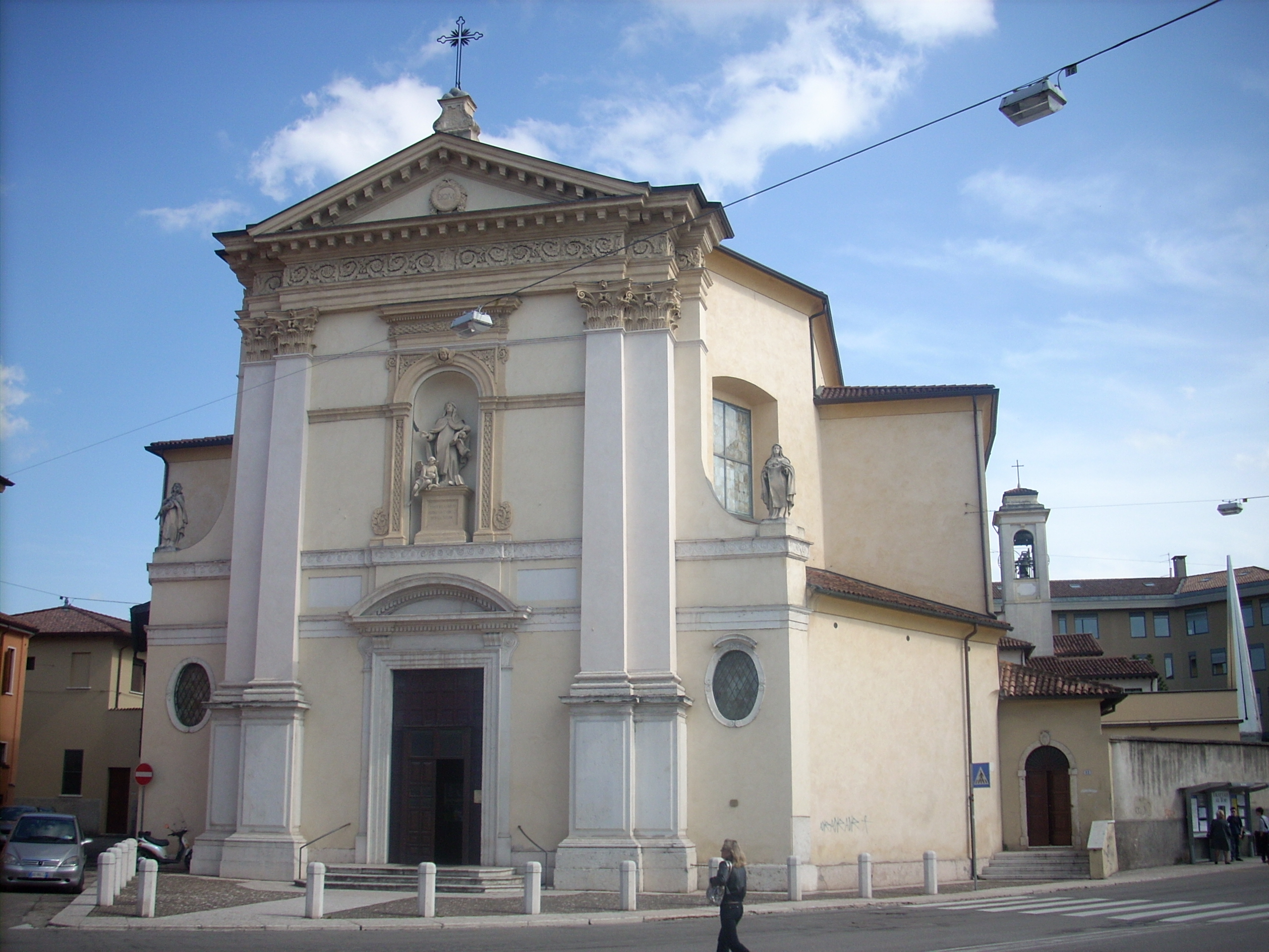 Chiesa degli Scalzi in Verona, facade